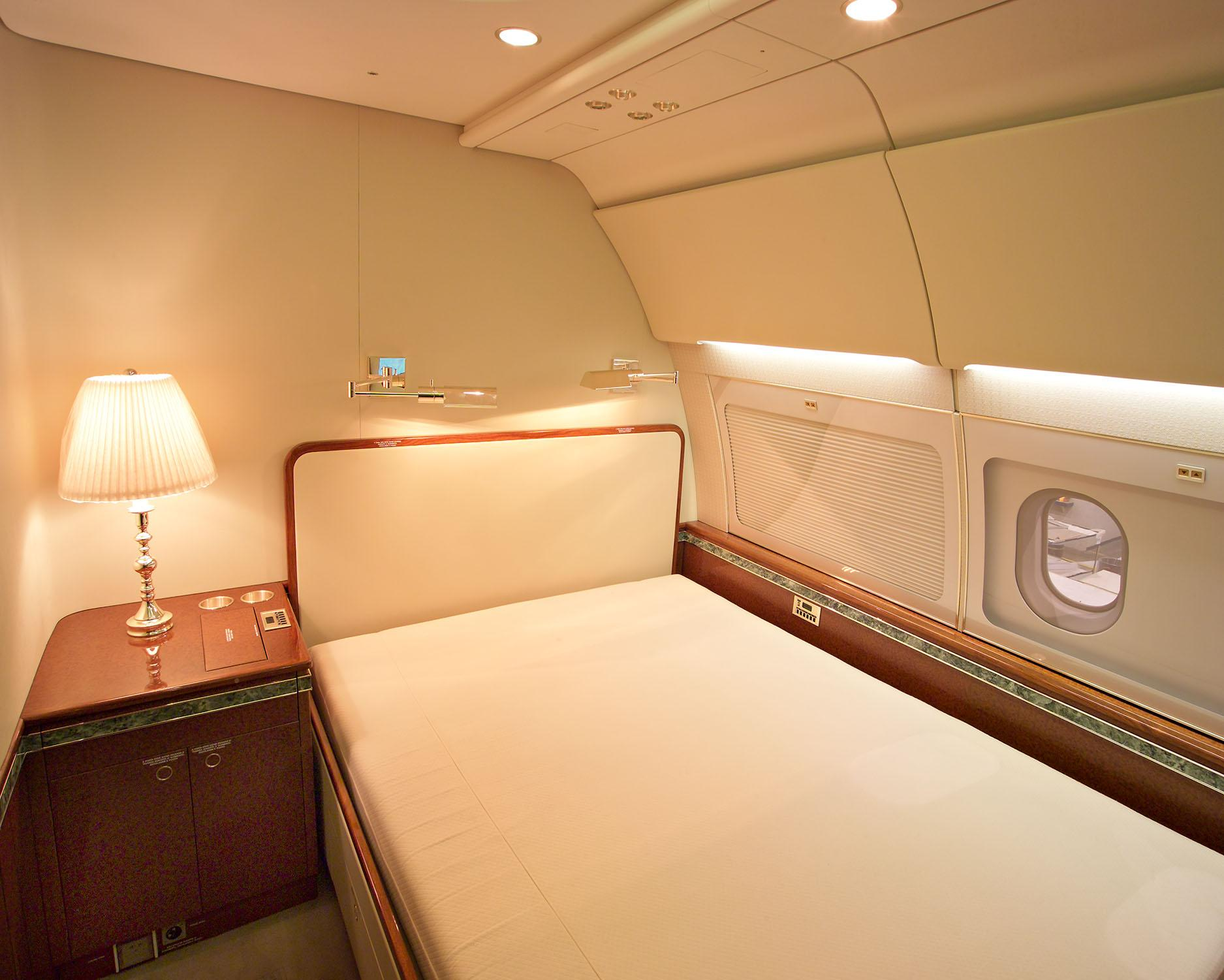 A Aeronave presidencial (FAB 001; Aerolula) brasileira.